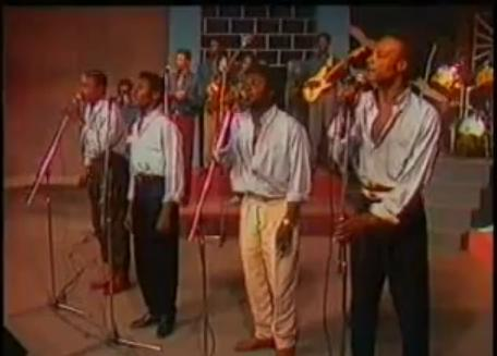 Choc Stars en concert à Kinshasa en 1986